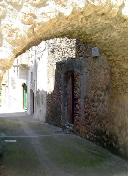 Carrer de Vilanant (Alt Empordà - Catalunya)